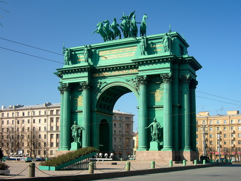 Narva Triumphal Gate